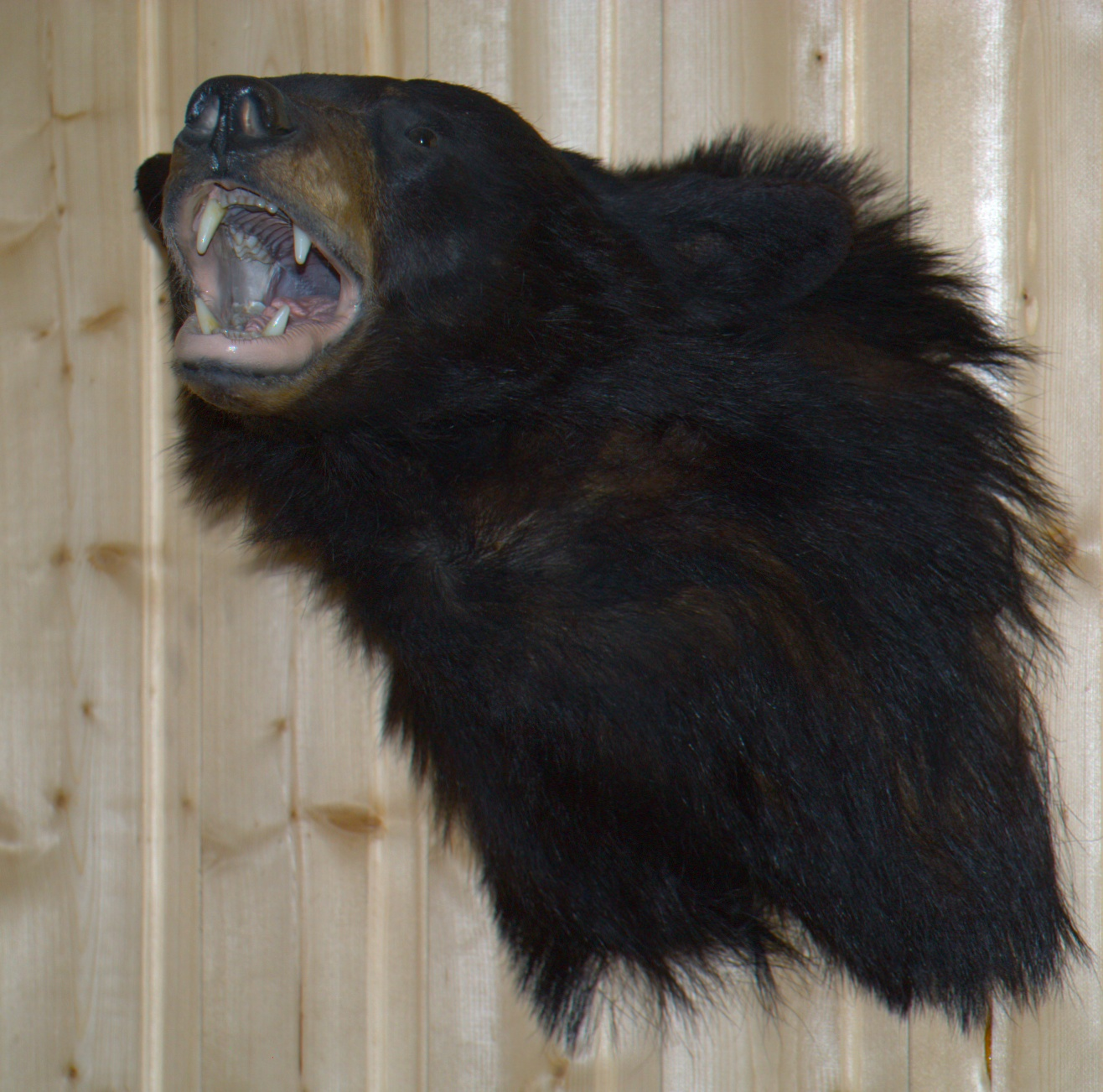 Foto: John erling Blad